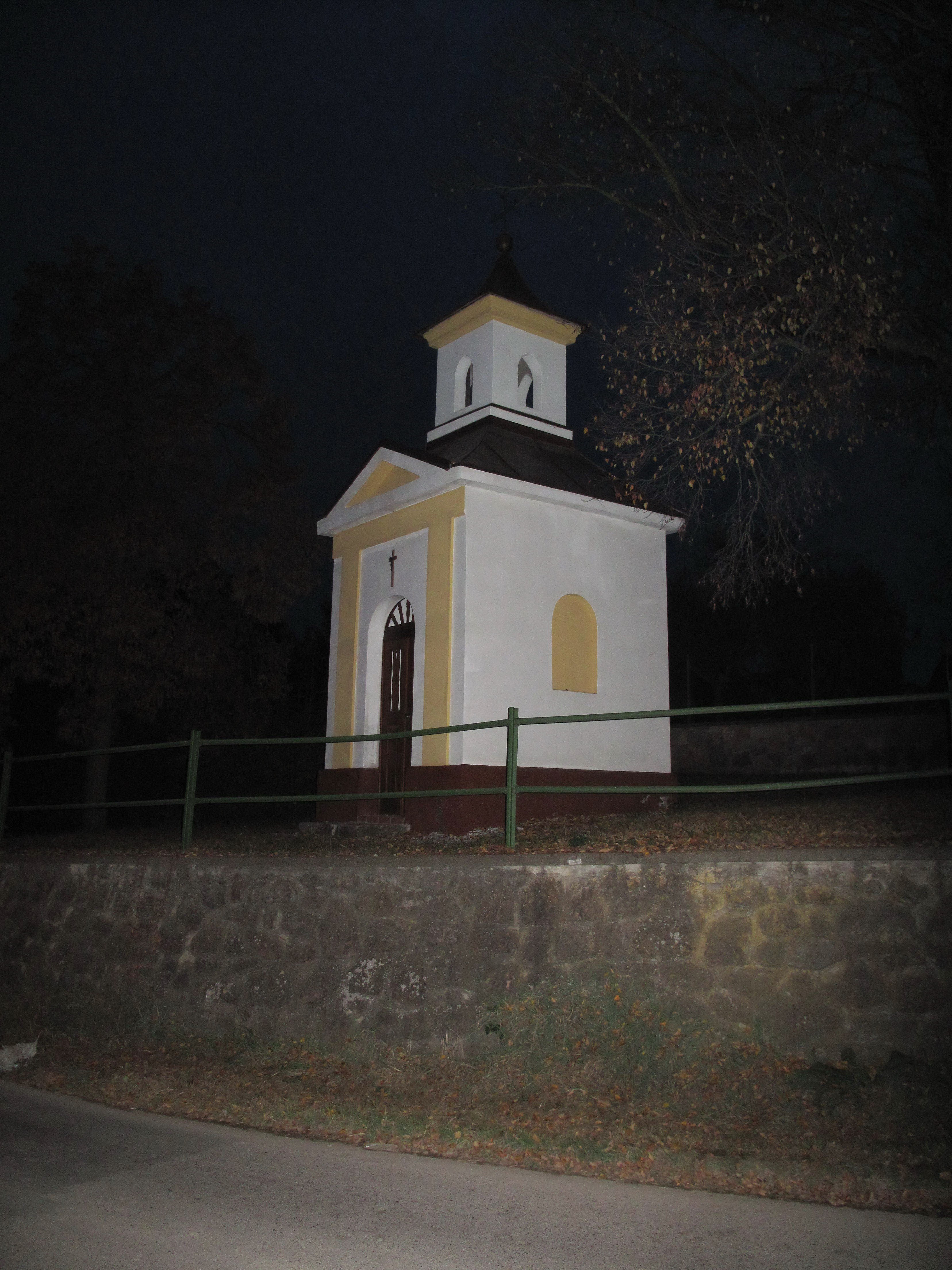 Kaplička v Bubovicích